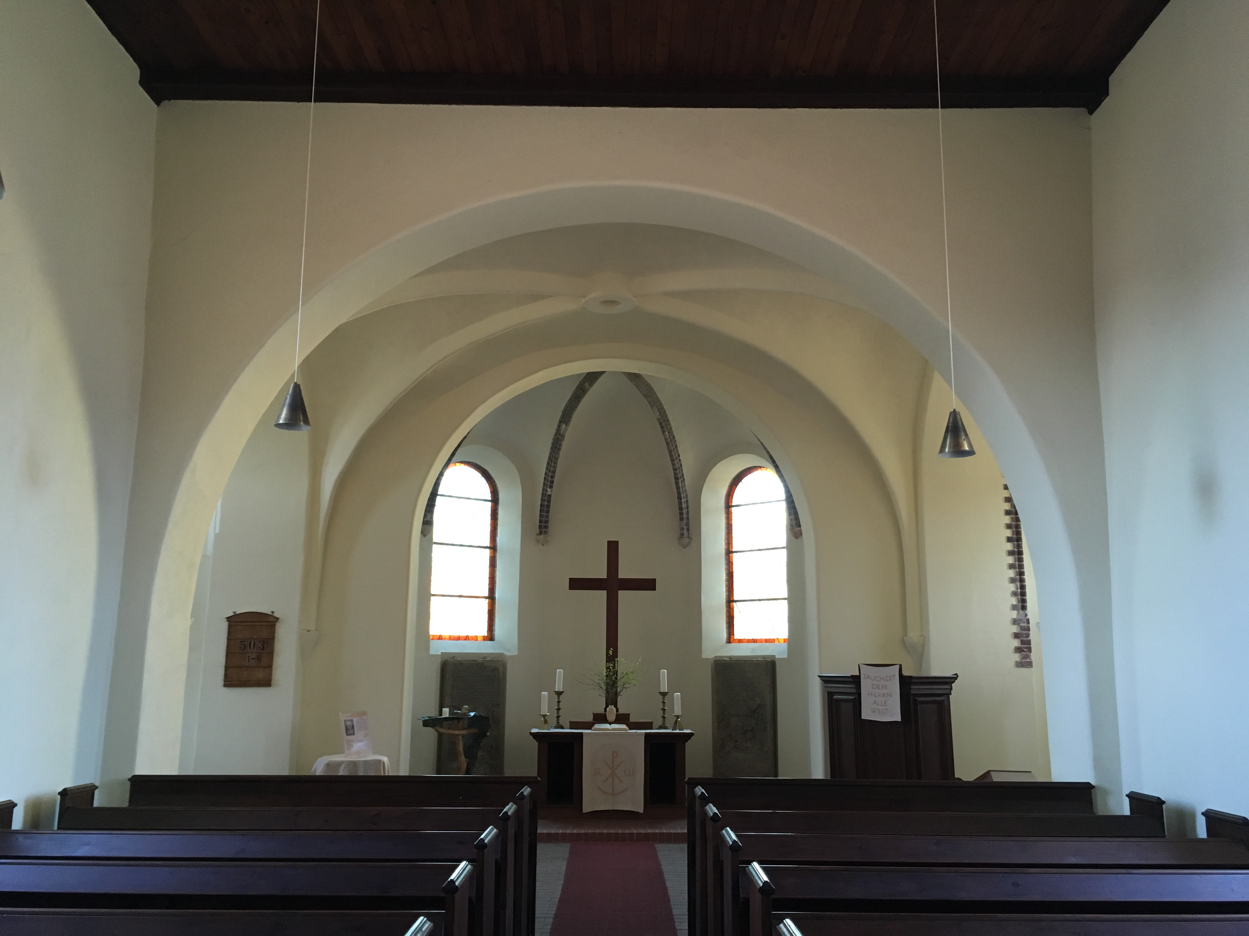 Die neogotische Saalkirche in Fürstlich Drehna wurde ursprünglich im Spätmittelalter errichtet und 1895 umfangreich umgebaut.